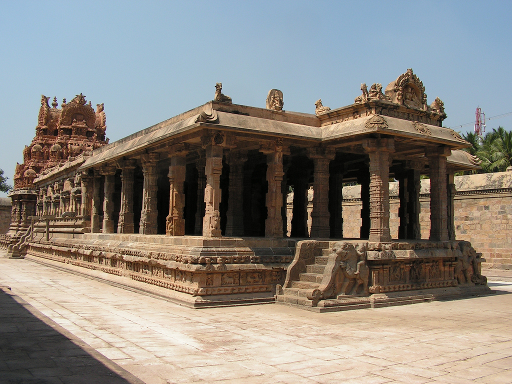 Periya Nayaki amman's temple at Darasuram